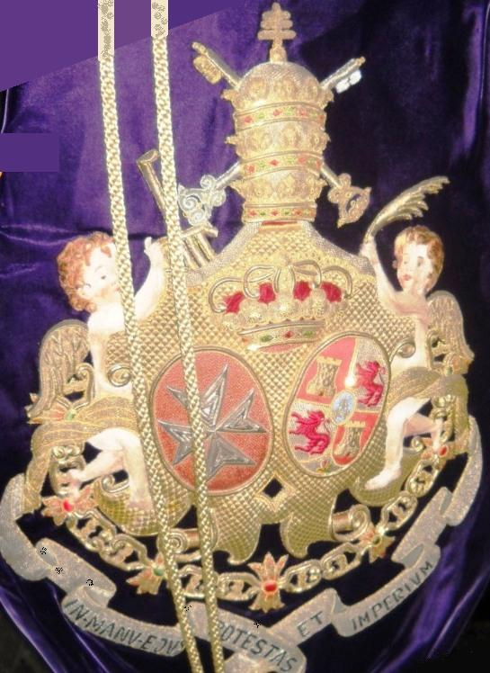 Escudo que aparece en el escudo de la Hermandad